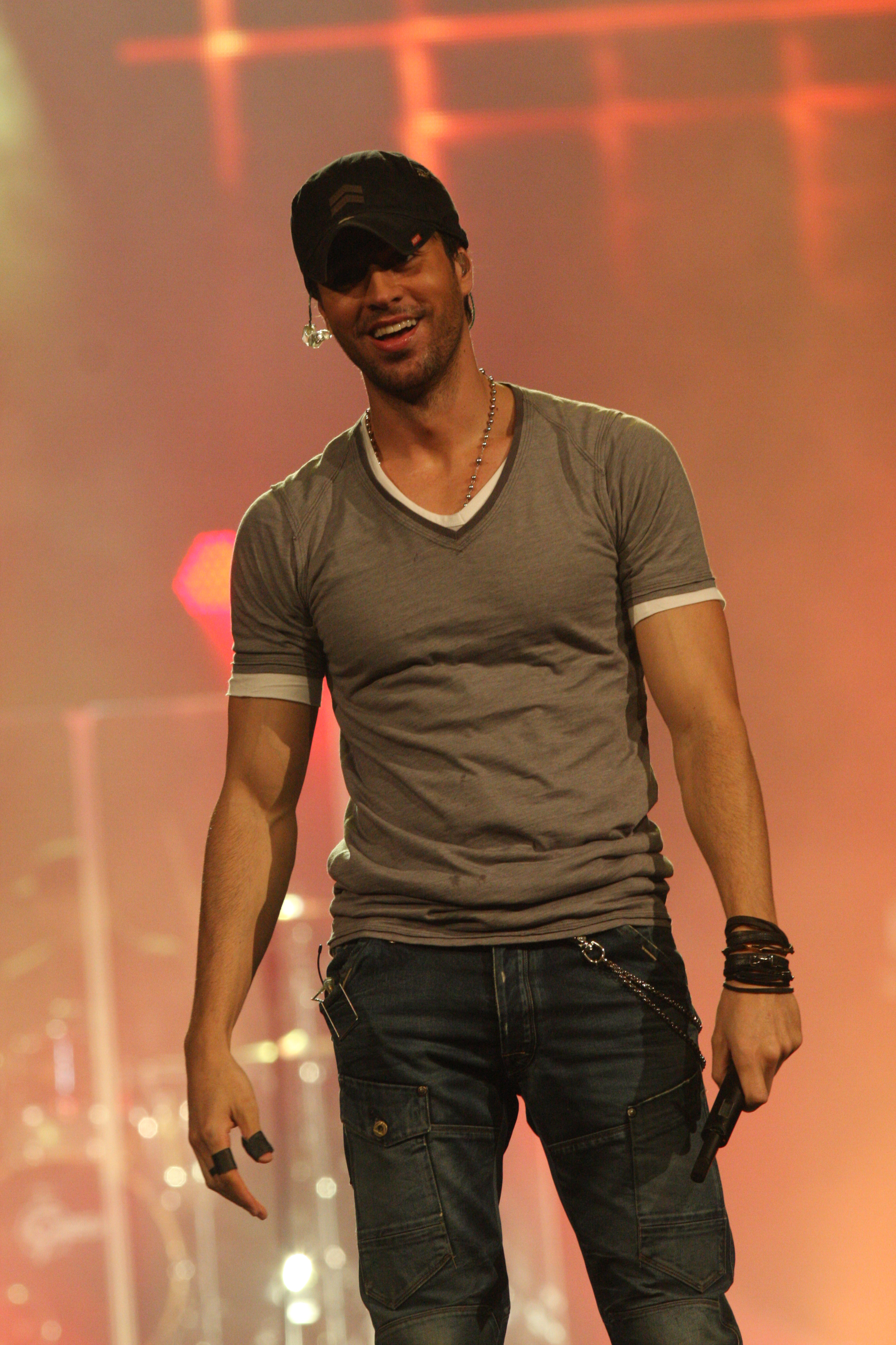 Enrique Iglesias